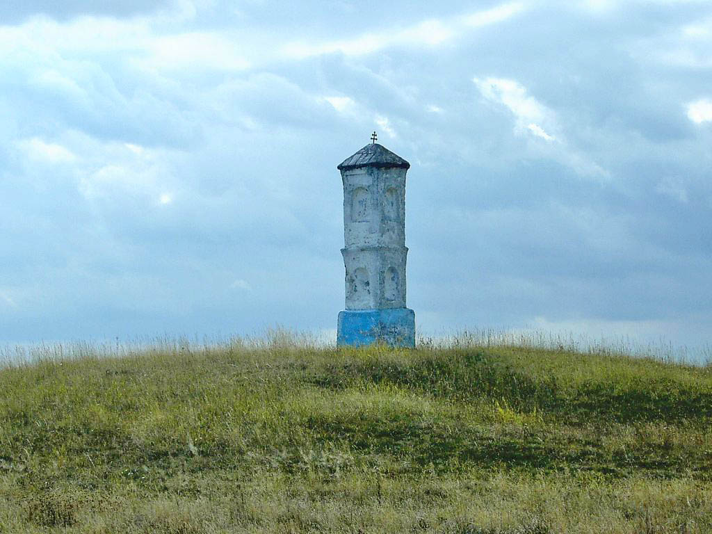 Boží muka nazývaná Svatý Antoníček na okraji obce Mohelno, district Třebíč autor: Prazak